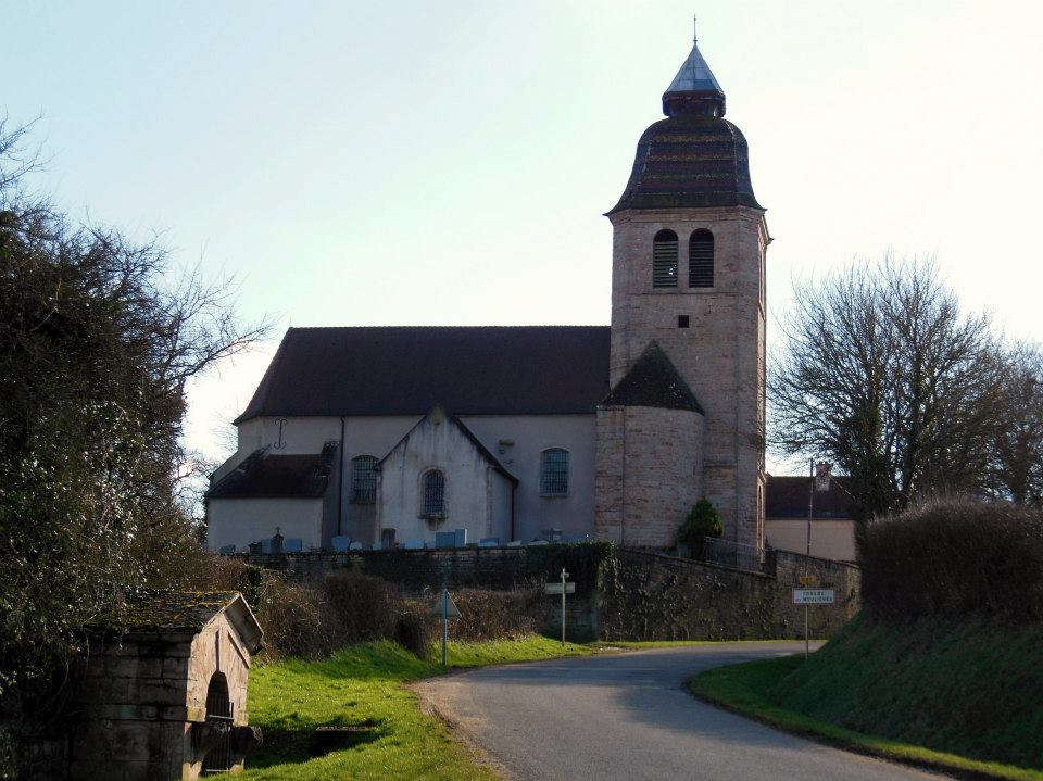 Eglise Saint-Michel (XVIe-XVIIIe s), Rue Saint-Michel, à Frasne-les-Meulières (Jura).